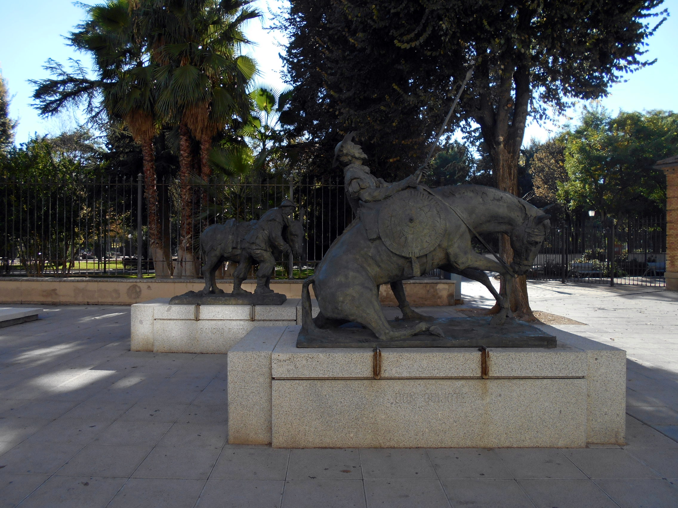 Monumento a los personajes cervantinos.